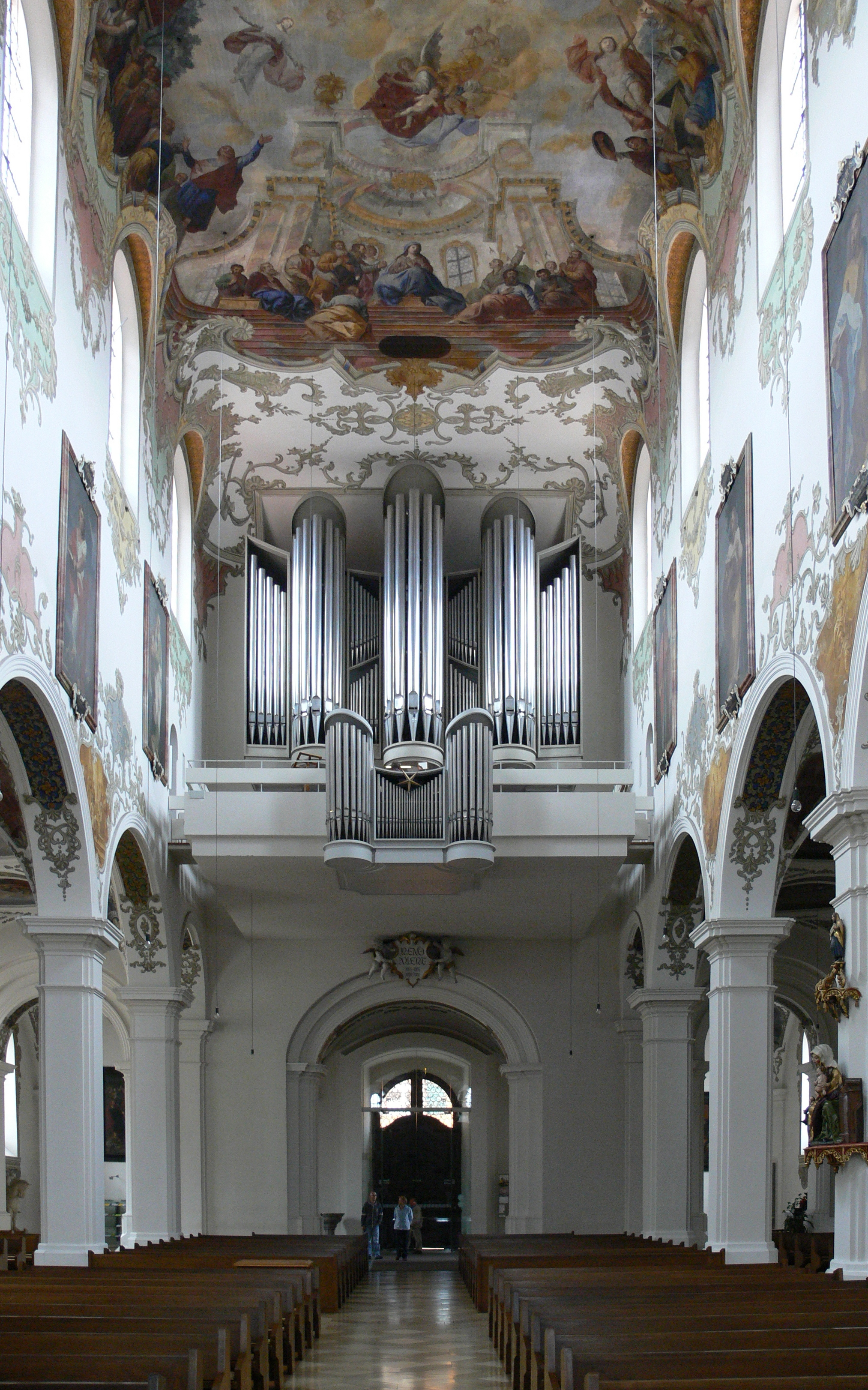 Stadtpfarrkirche St. Martin, Biberach an der Riß Langhaus, Blick zur Orgelempore